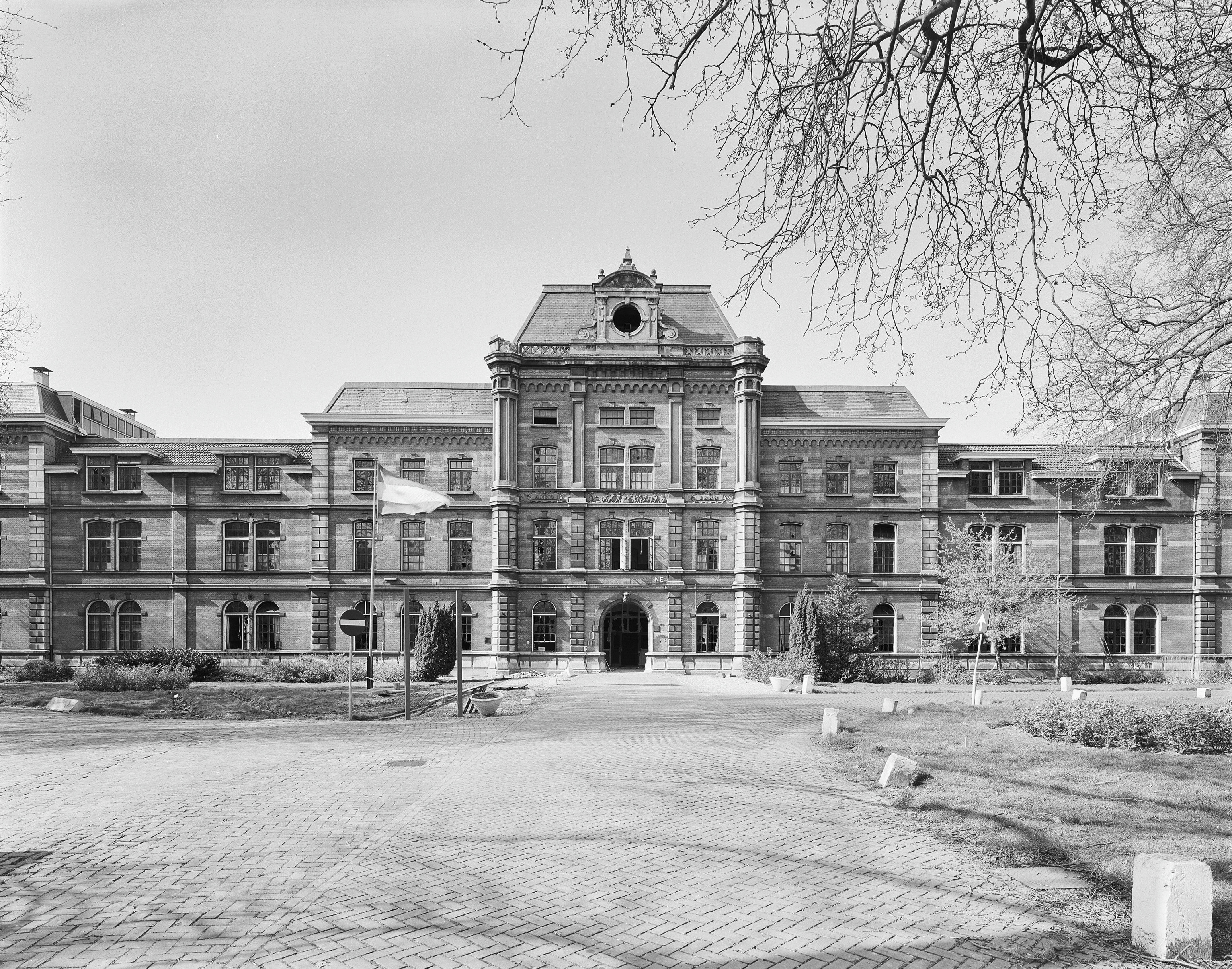 Hojel Kazerne: Exterieur